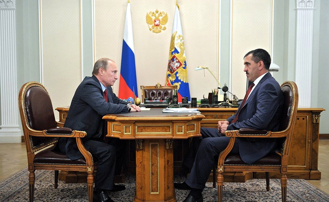 Встреча Владимира Путина с Юнус-Беком Евкуровым